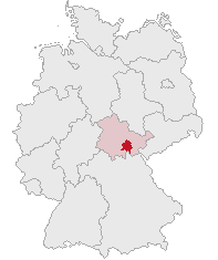 Landkreis Saalfeld-Rudolstadt, Thuringia, Germany